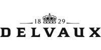 Première maison de maroquinerie de luxe en Europe créée en 1829 par Charles delvaux.